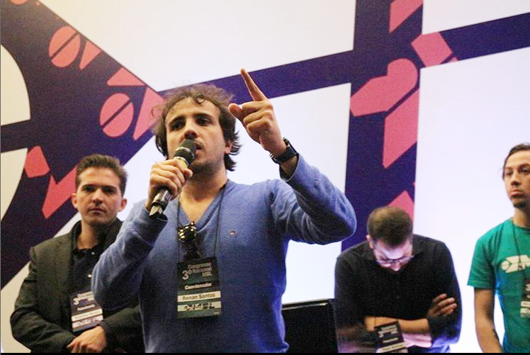 Foto Congresso